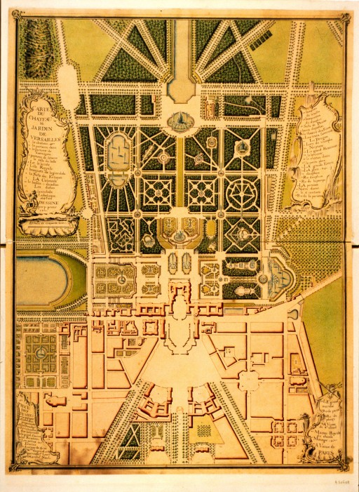 Carte du château & jardin de Versailles. (Plan géométral et descriptif), 1750, dessin de Prieur, P. (17..-17..)